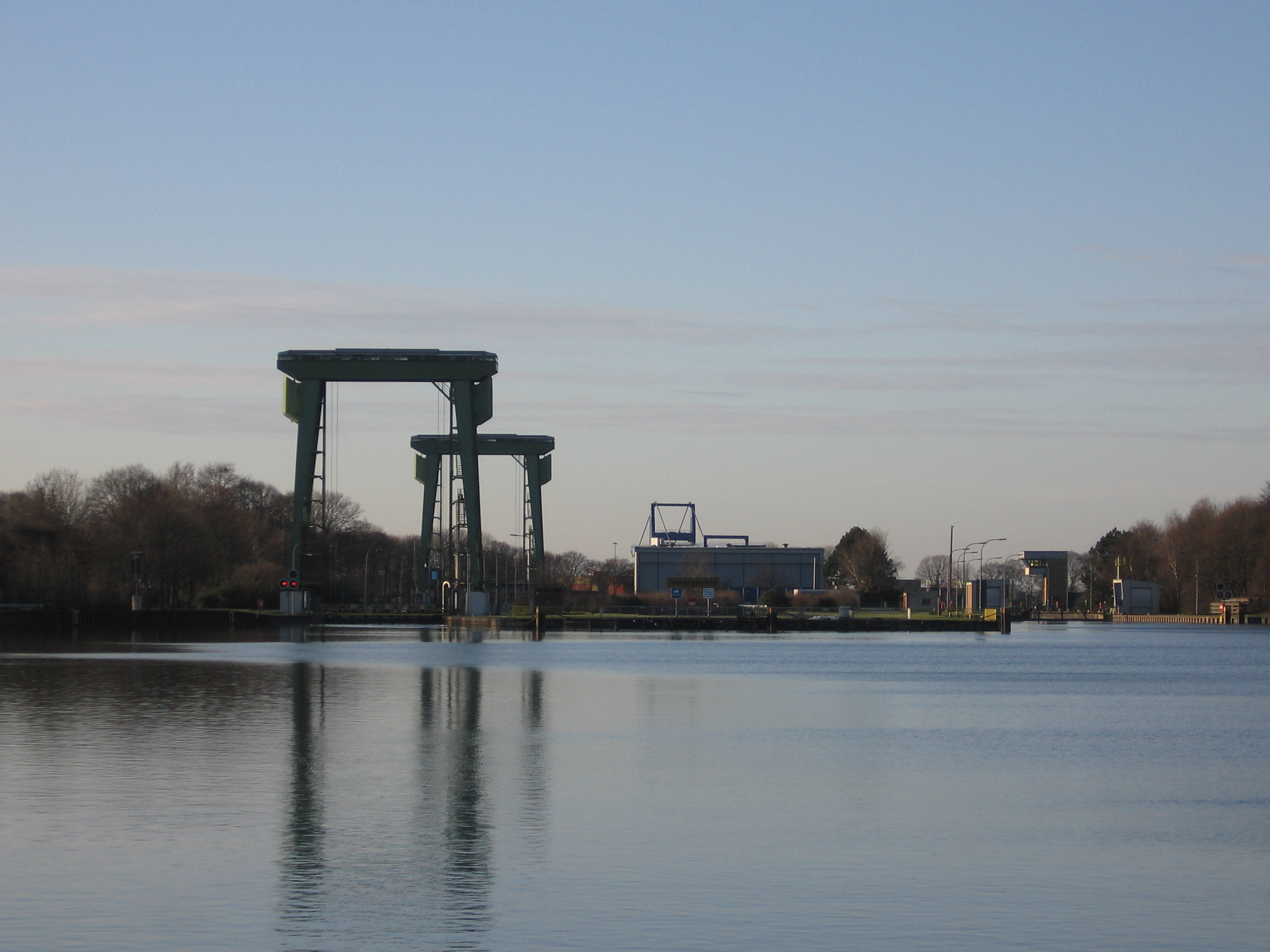 Schleuse Friedrichsfeld